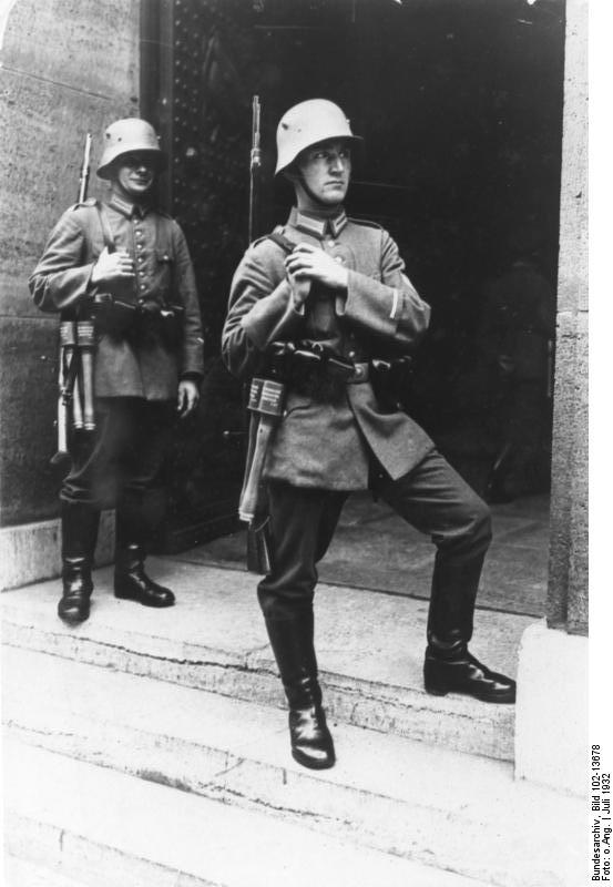 Der Ausnahmezustand in Berlin! Die von der Militärbehörde verhafteten und ihres Amtes enthobenen preussischen Polizeiminister Severing, Grzesinsky, Dr. Weiss und Kommandeur Heimannsberg. Reichswehrposten mit Karabiner und Handgranaten, als Wache vor dem Reichswehrministerium in Berlin.